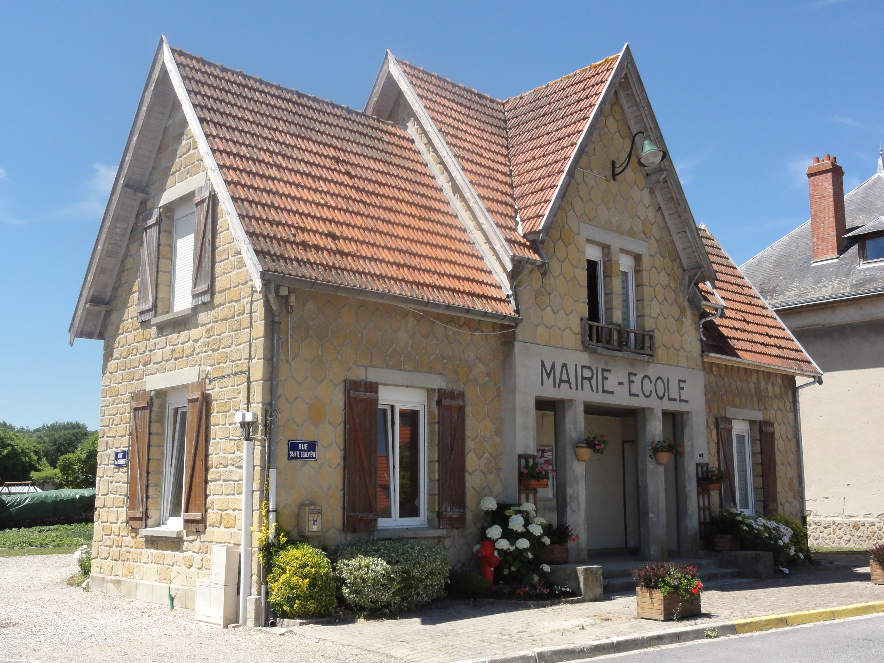 Bertricourt (Aisne) mairie-école